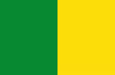 Bandera del Municipio de Amatitlán, Guatemala, creada en 1974 por J. Augusto Reynosa Orellana y Efraín Alfredo Guzmán Monasterio